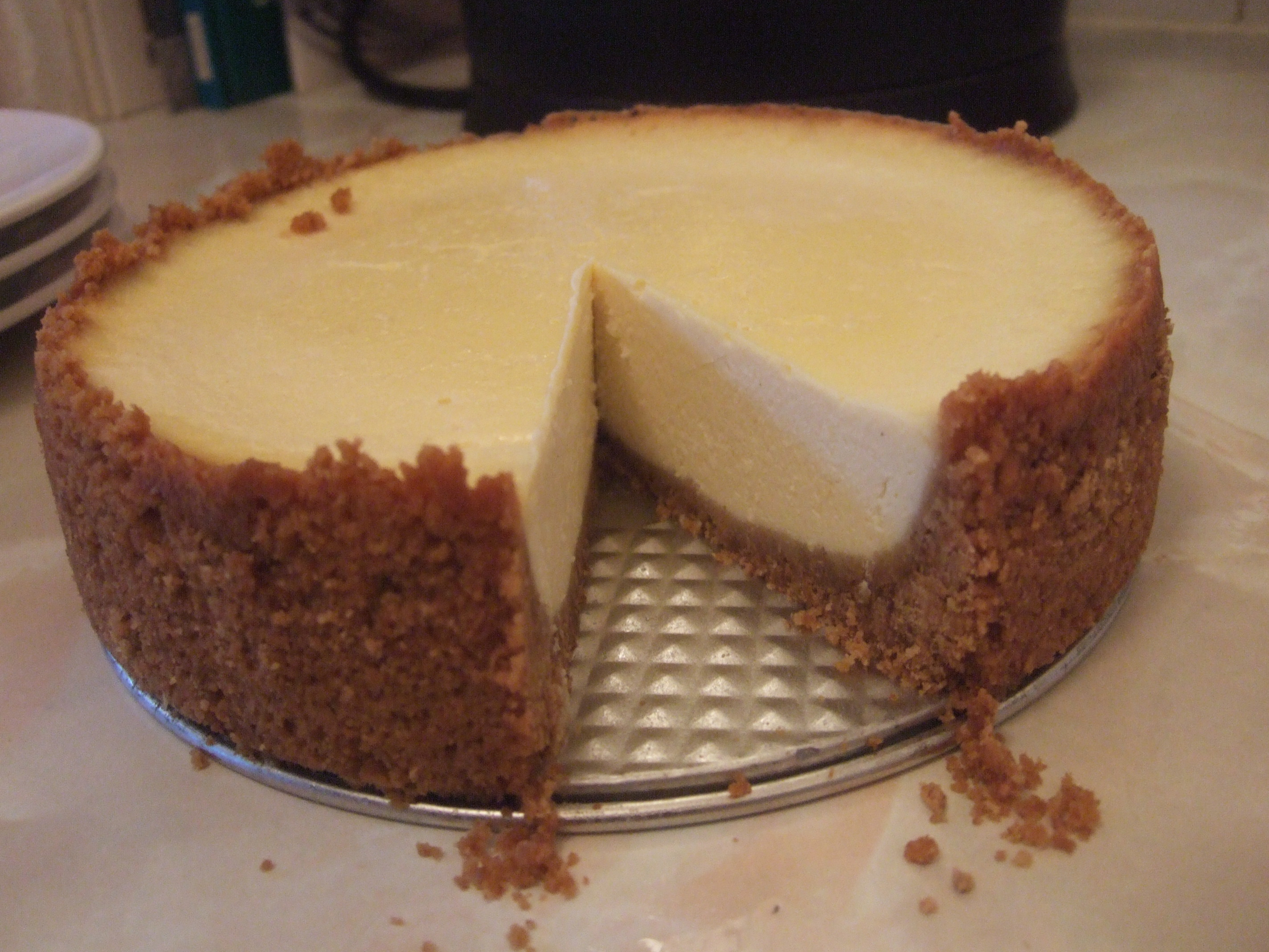 Needed waaay more sugar.